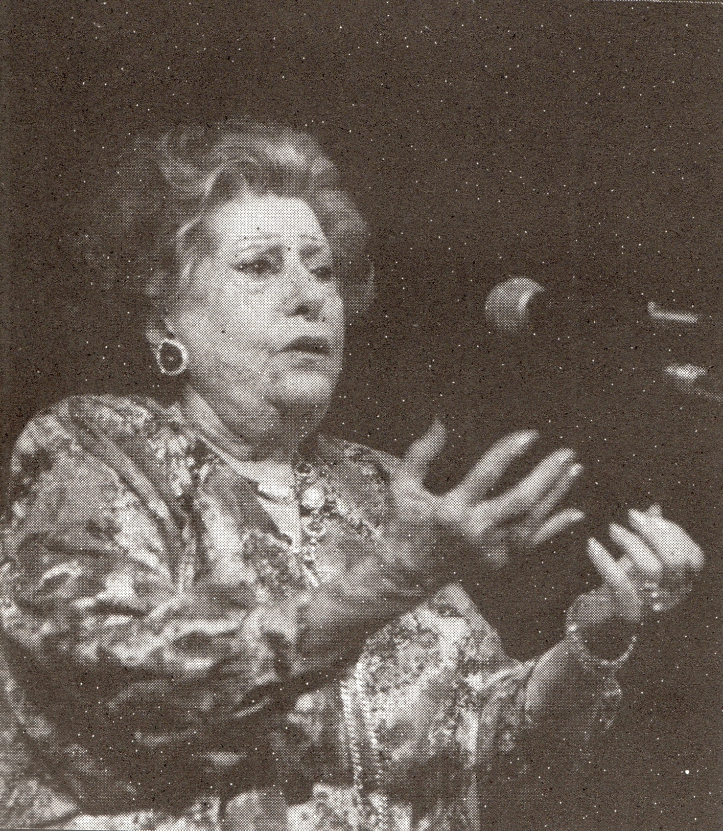 La cantante Tania cantando sobre un escenario.